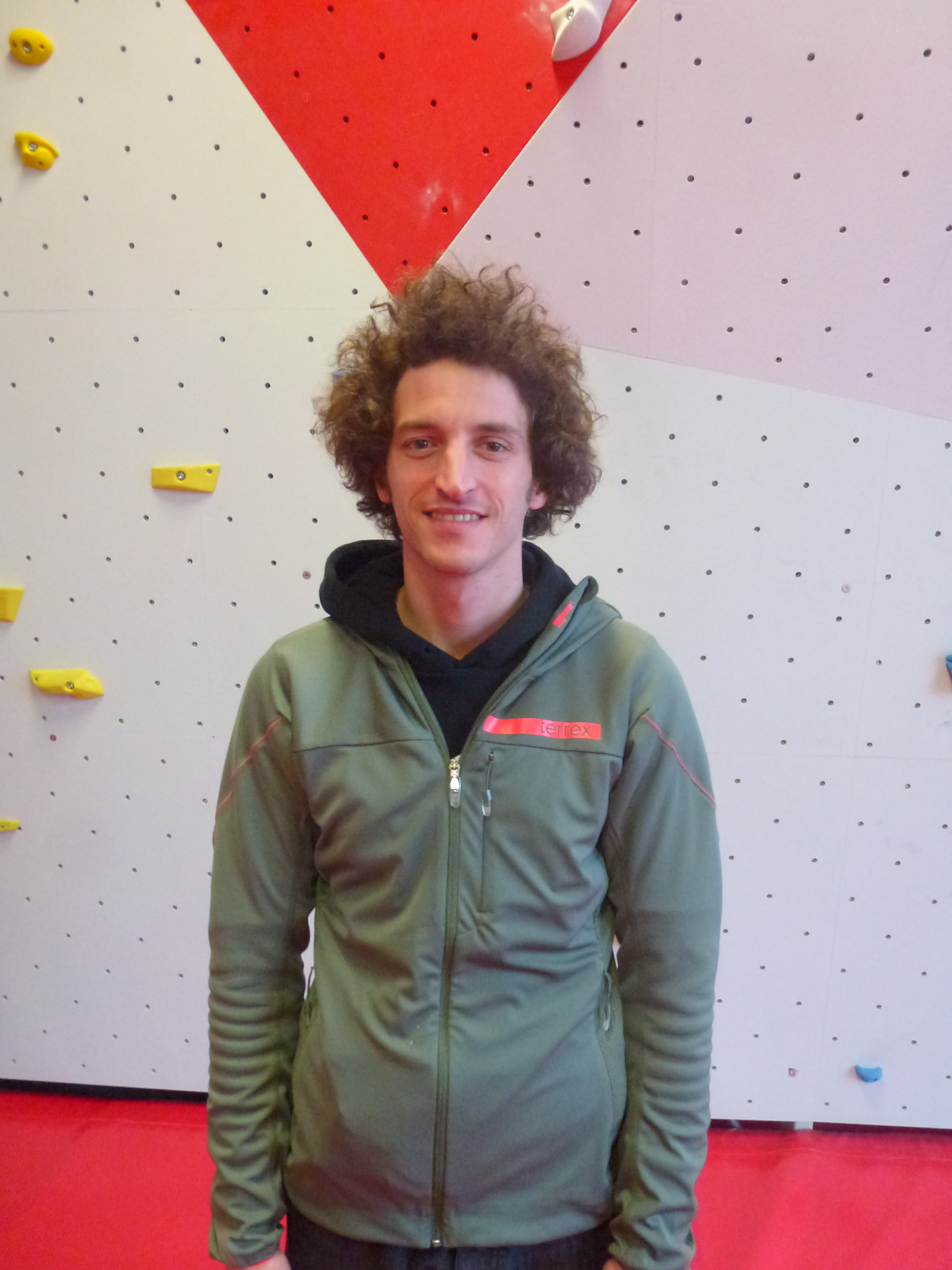 Guillaume Glairon Mondet le 2 avril 2015 à Climb Up Aix